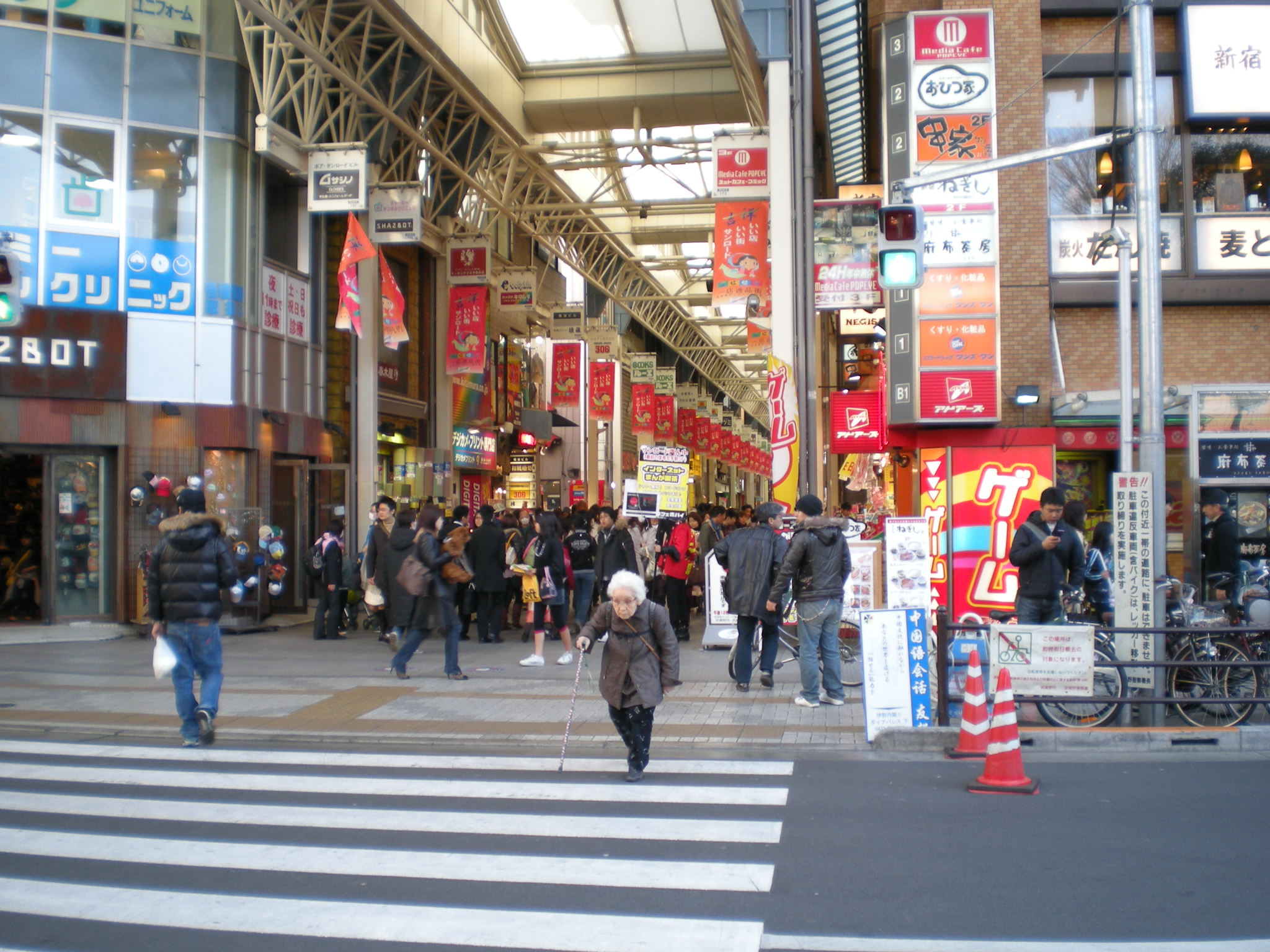 Kichijoji